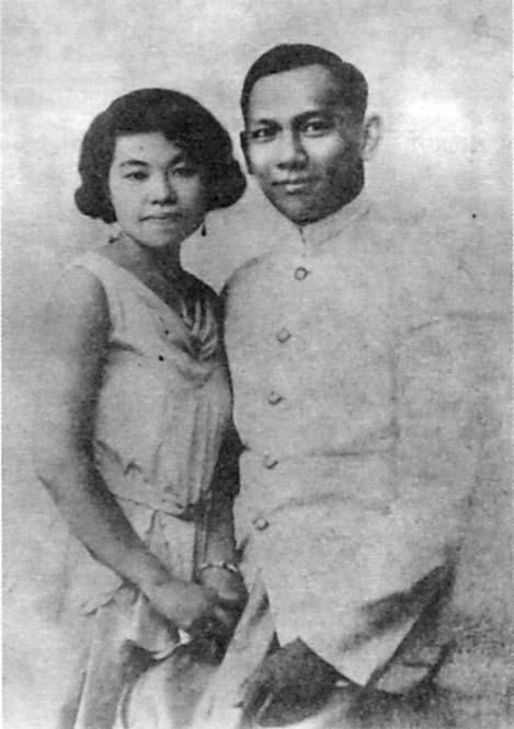 Wedding portrait of Mom Luang Pin Malakul and Dussadeemala Krairiksh